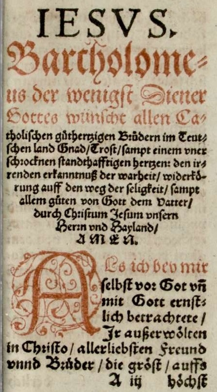 Bartholomäus Kleindienst: Einœ recht Catholisch vnd Euangelisch Ermanung an seine lieben Teutschen : Darinn klaerlich, schrifftlich ... wirdt angezeigt wie sich die ... Christen im Glauben vnd Religions sachen ... halten sollen ..., Dillingen 1560, Textbeginn